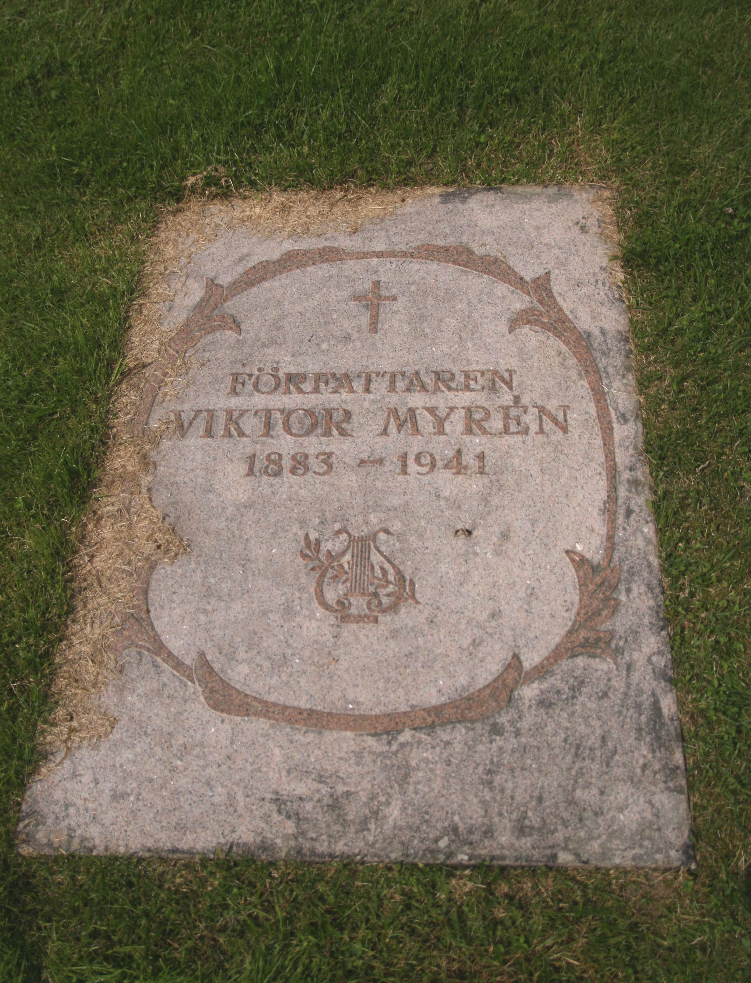 Gravminne över författaren Viktor Myrén, född 1883 på gården Myrstacken i Nössemarks församling i Dalsland, död 1941.